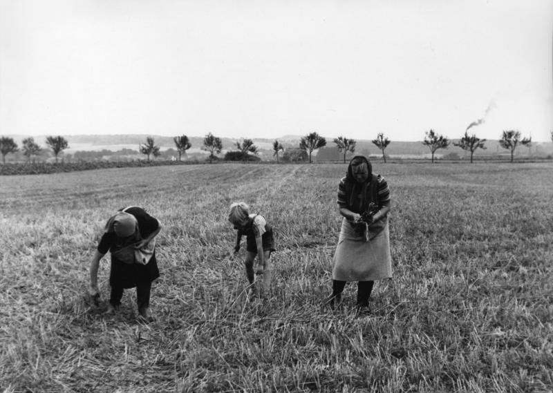 Gut Bolten in Enzen bei Zülpich, 8.8.57Ährenlesen ist hinter dem Mähdrescher nicht mehr lohnend